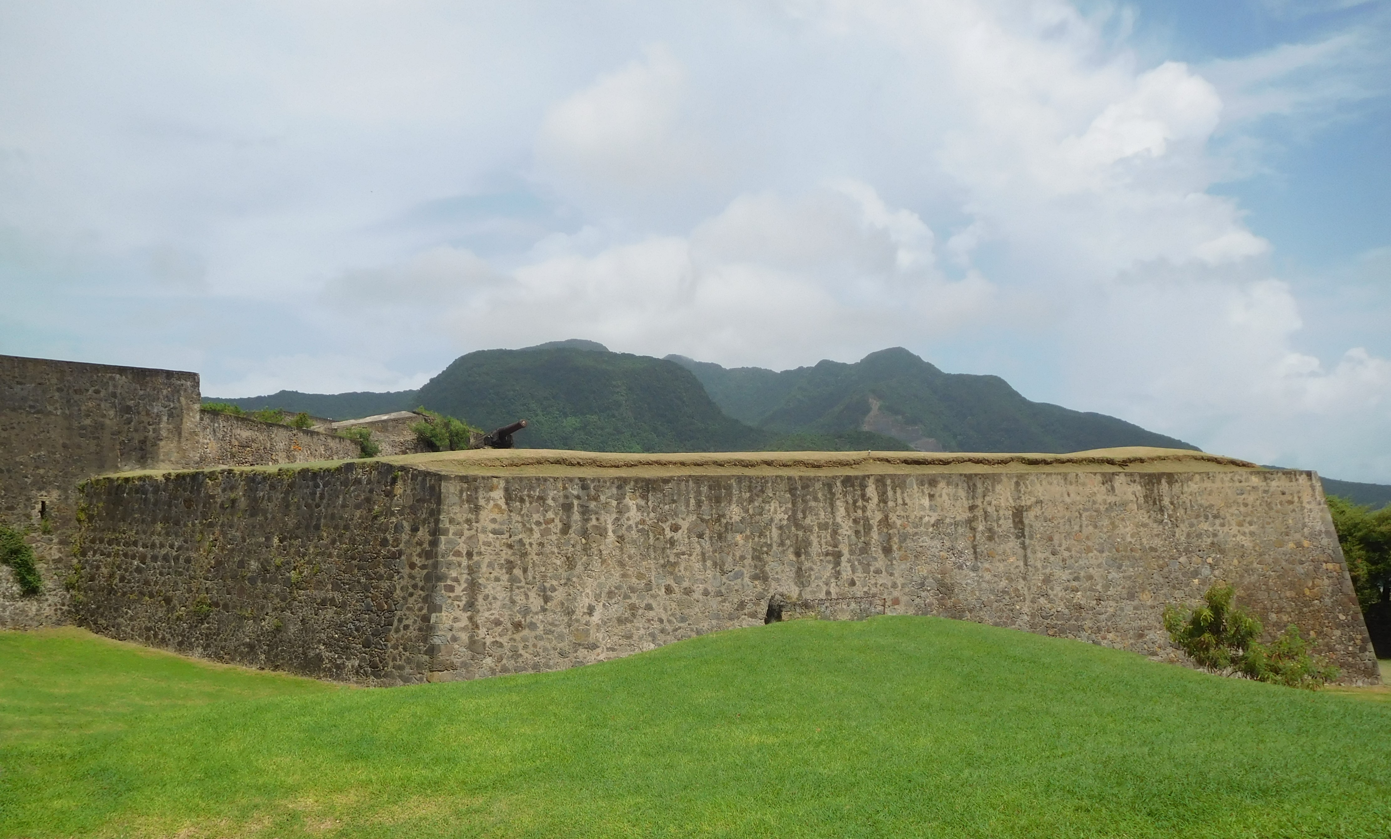 Le Fort Louis Delgrès de la Guadeloupe .